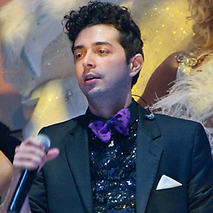 Группа «Morandi» на на шоу-показе в клубе «РАЙ». 2011 год.